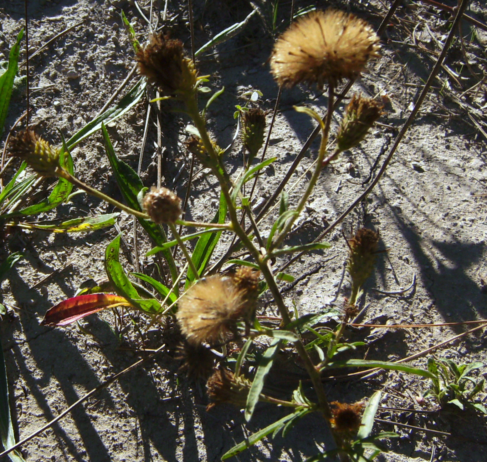 Jasonia tuberos fructificada, Castelltallat, Bages